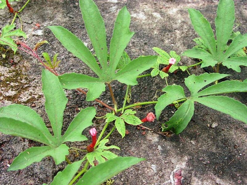 Các loài TV có tên Latin